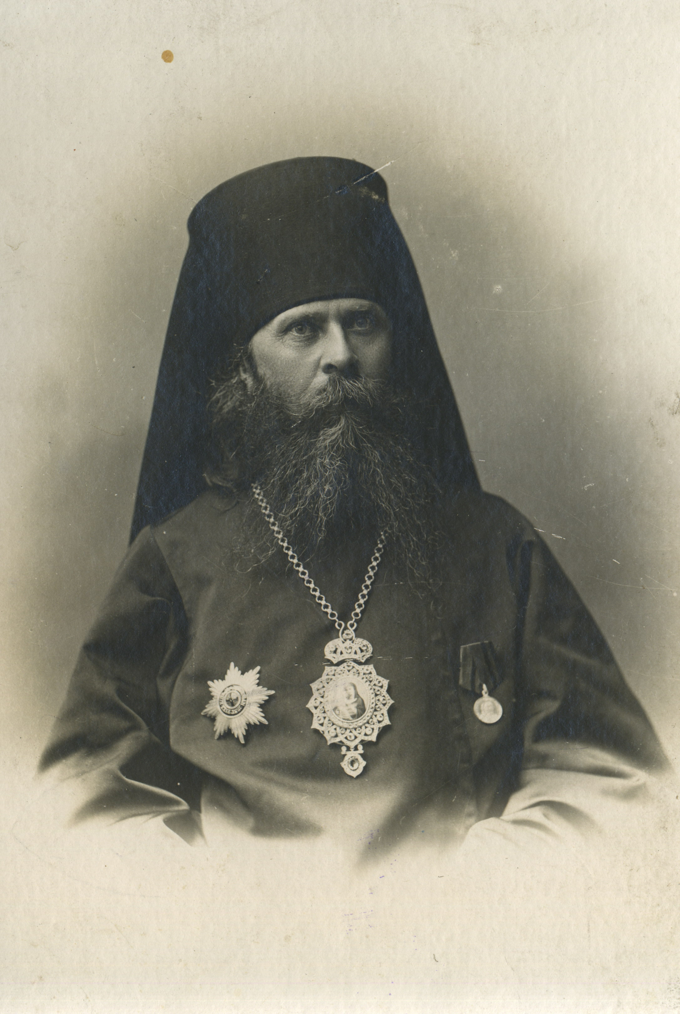 Епископ Муромский Александр (Трапицын) Место съемки: Владимирская губерния Место хранения: Муромский музей